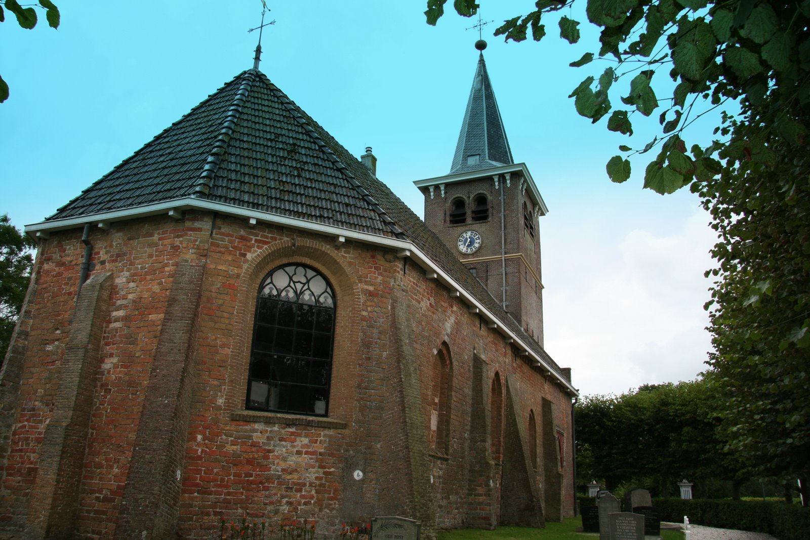 Kerkje van Blessum.